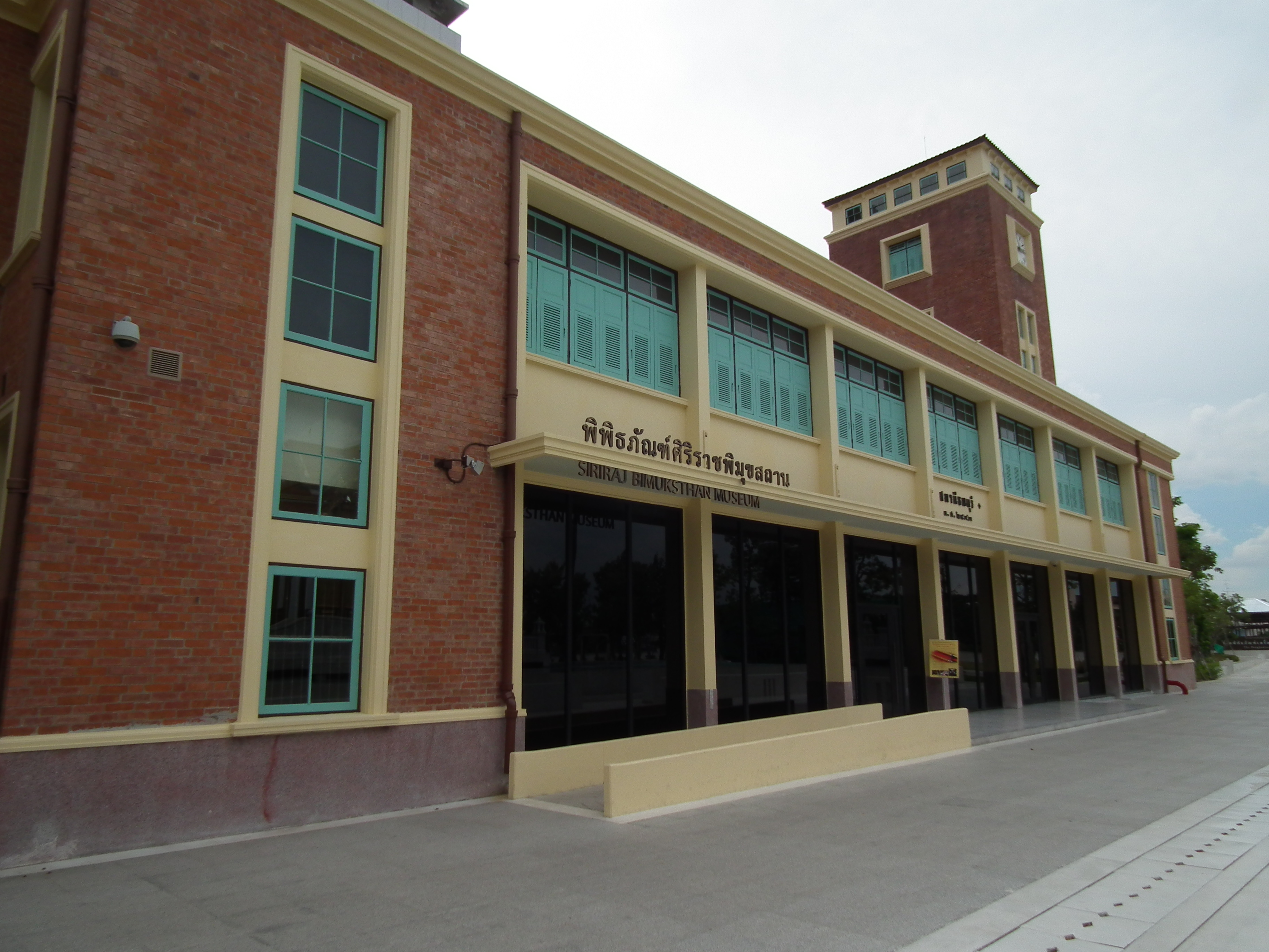 พิพิธภัณฑ์ศิริราชพิมุขสถาน